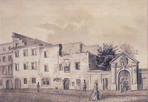 Kraków, ul. Grodzka, Bursa Długosza zwana Iurisperitorum